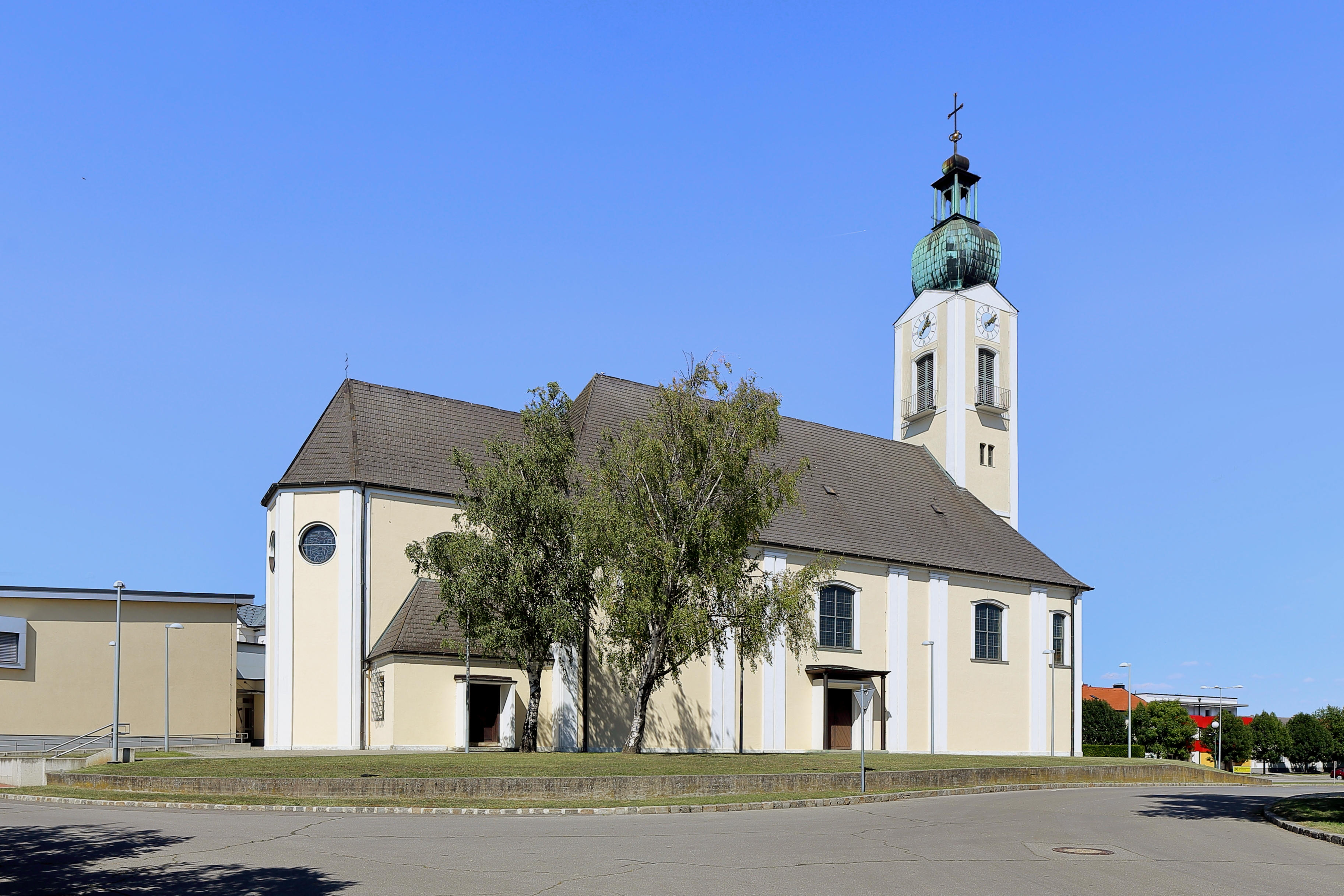 Südwestansicht der röm.-kath. Pfarrkirche hl. Andreas der burgenländischen Marktgemeinde St. Andrä am Zicksee. Die Kirche wurde anstelle einer Vorgängerkirche ab Frühjahr 1937 errichtet und am 5. September 1937 geweiht.